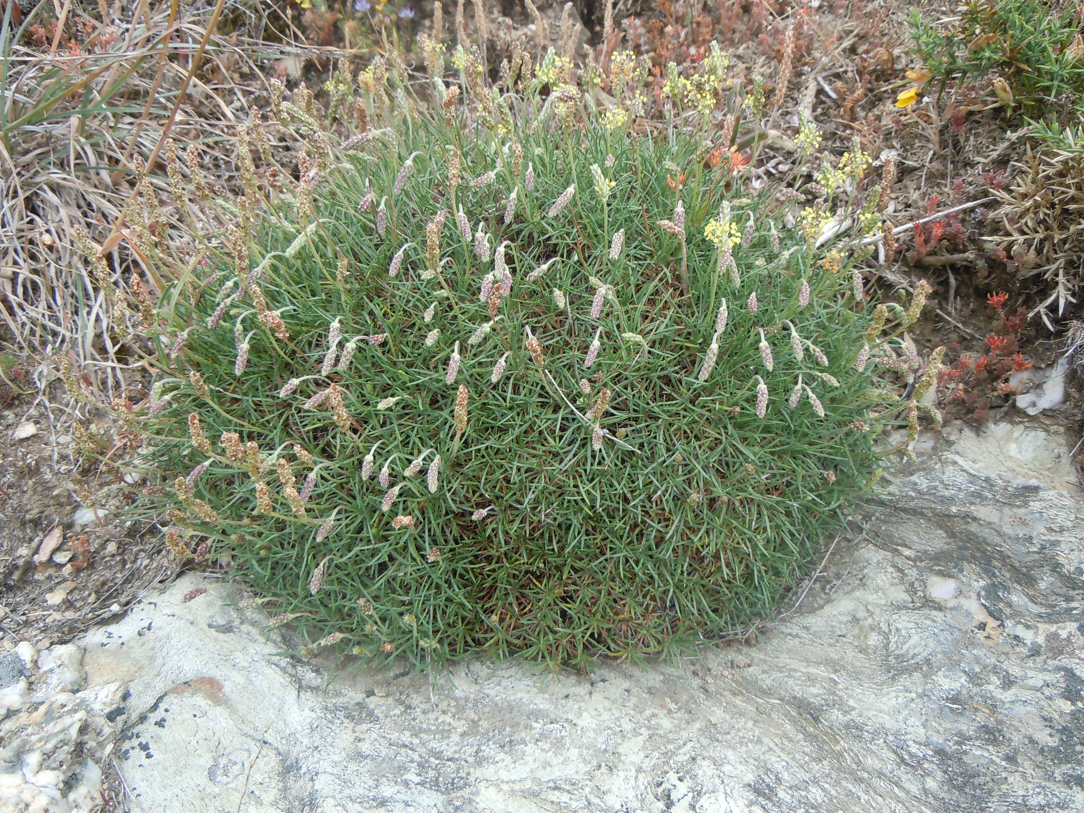 Plantain Caréné, Plantago holosteum, Belle-Île-en-Mer